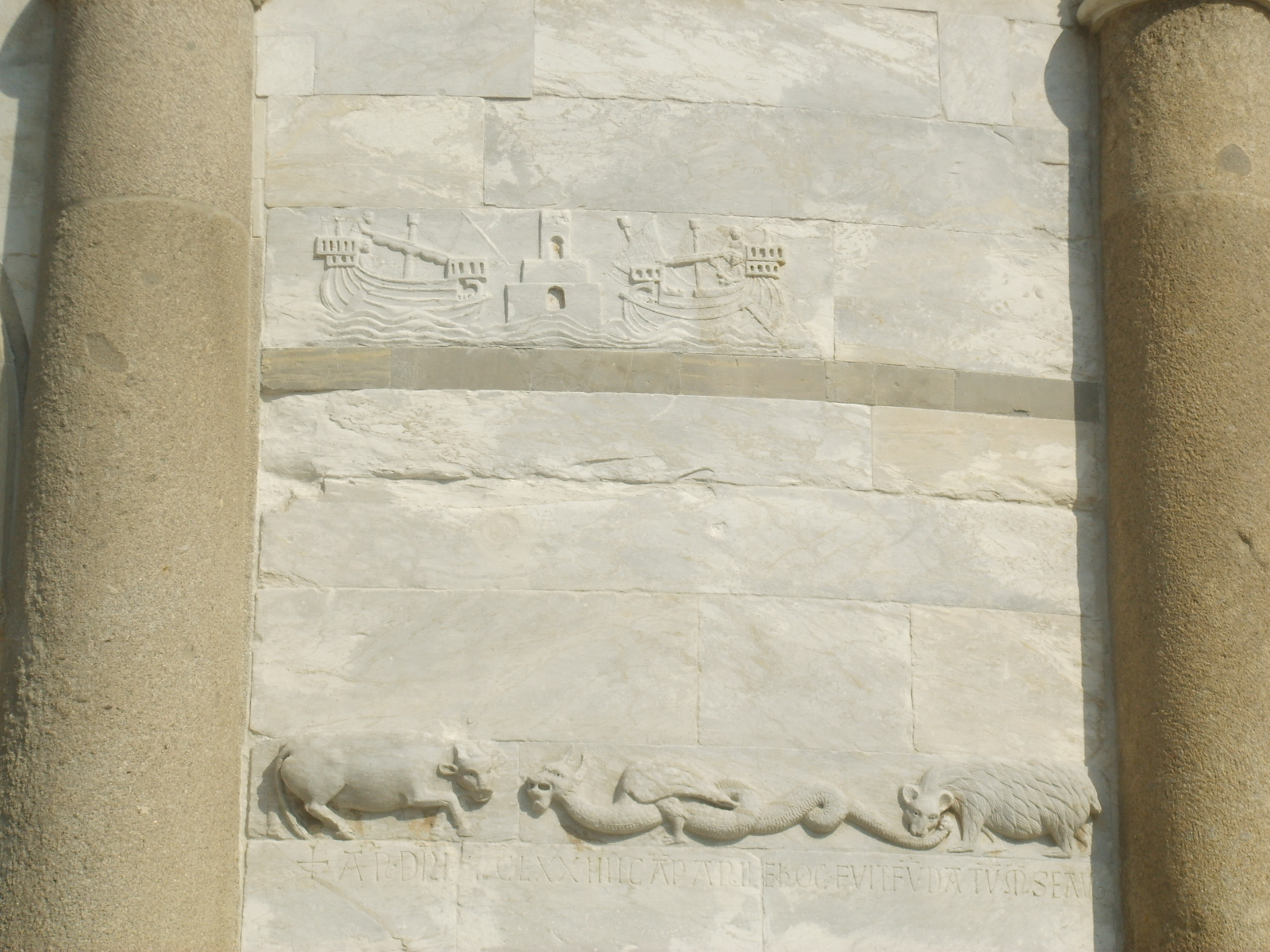 Torre_di_Pisa,_lastre_scolpite